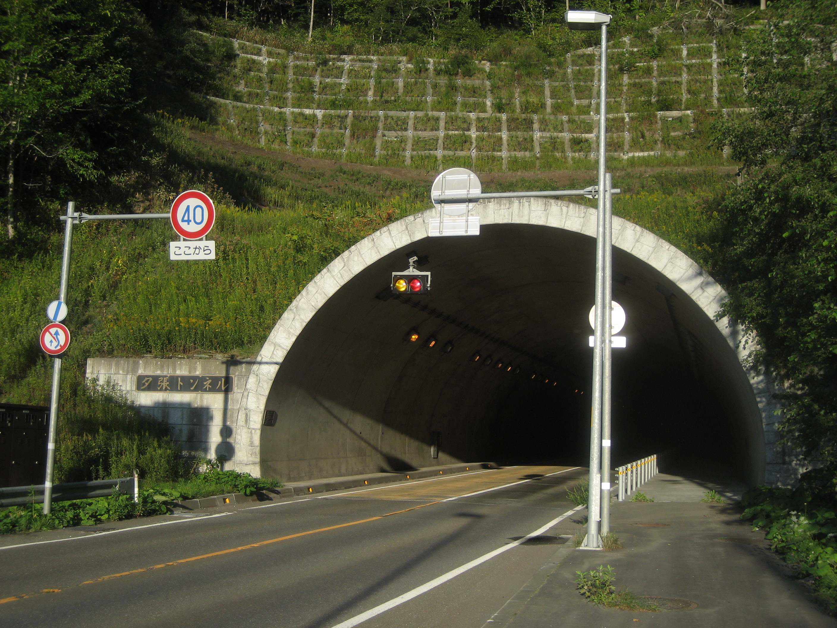 北海道道3号線夕張トンネル（栗山町側から撮影）